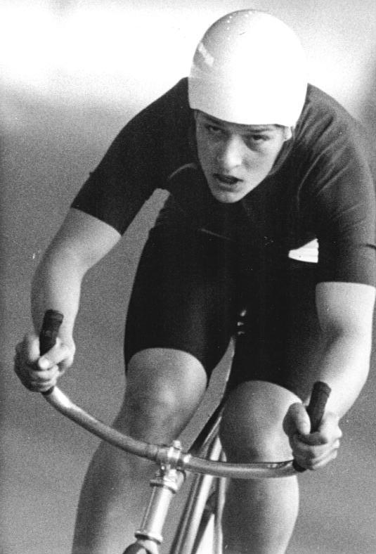 Petra Rossner ADN-ZB Kluger-27.6.87 Leipzig: DDR-Meisterschaften im Bahnradsport - Petra Roßner (SC DHfK Leipzig) verteidigte am 16.6. in der neuen Bahnrekordzeit von 4:01,46 min. erfolgreich den Meistertitel in der 3000-m-Einzelverfolgung.